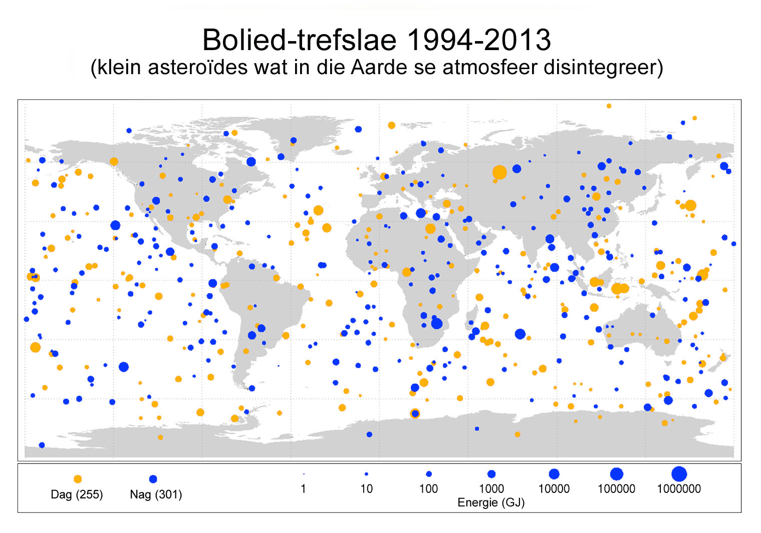 Frekwensie waarteen klein asteroïdes die Aarde se atmosfeer tref